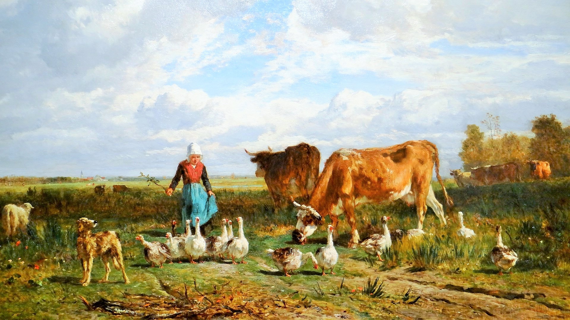 Le Patûrage à la gardeuse d'oies, 1854, huile sur toile, Constant Troyon